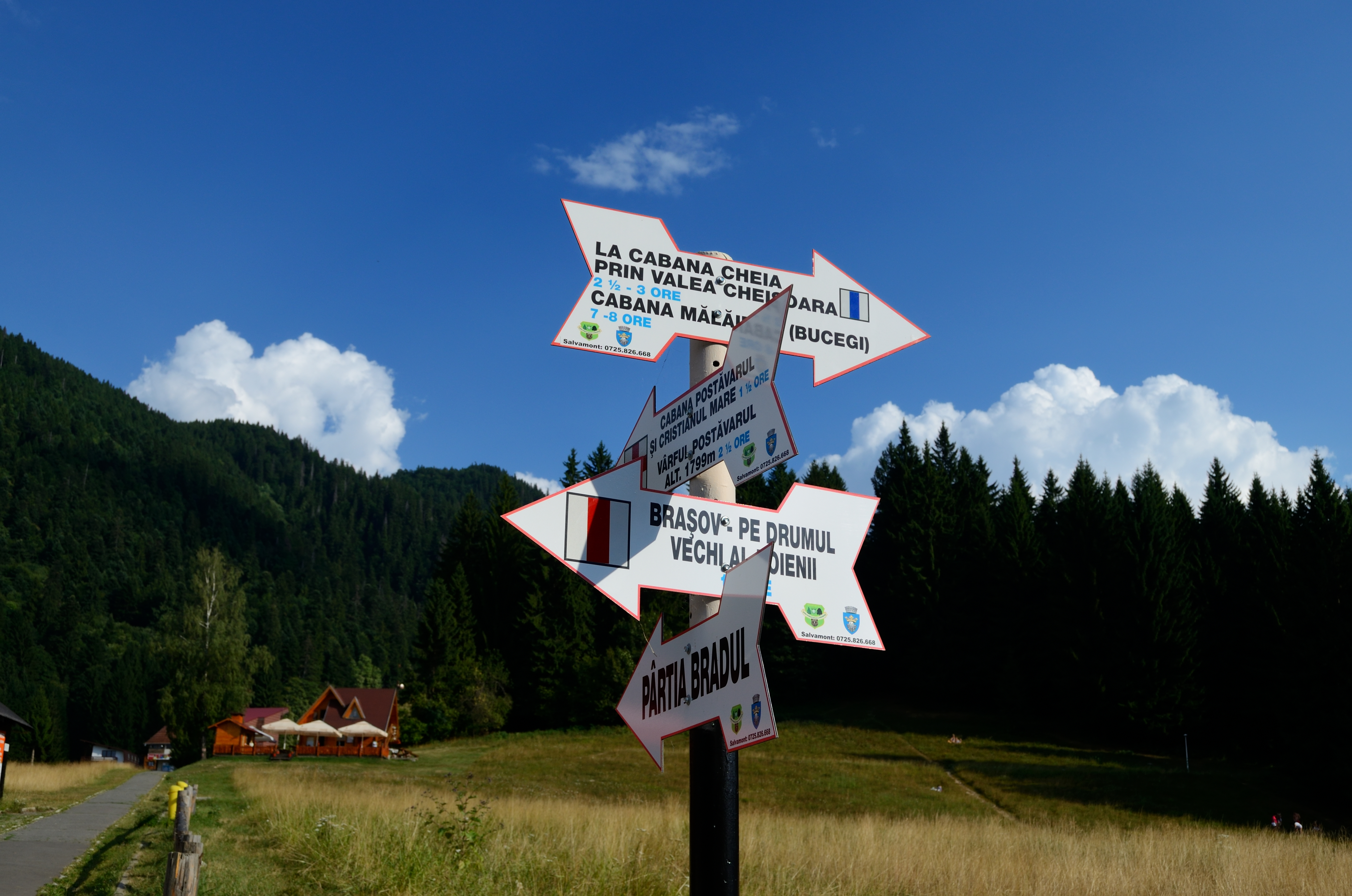 Српски (ћирилица): Путоказ за пешачке и планинарске стазе